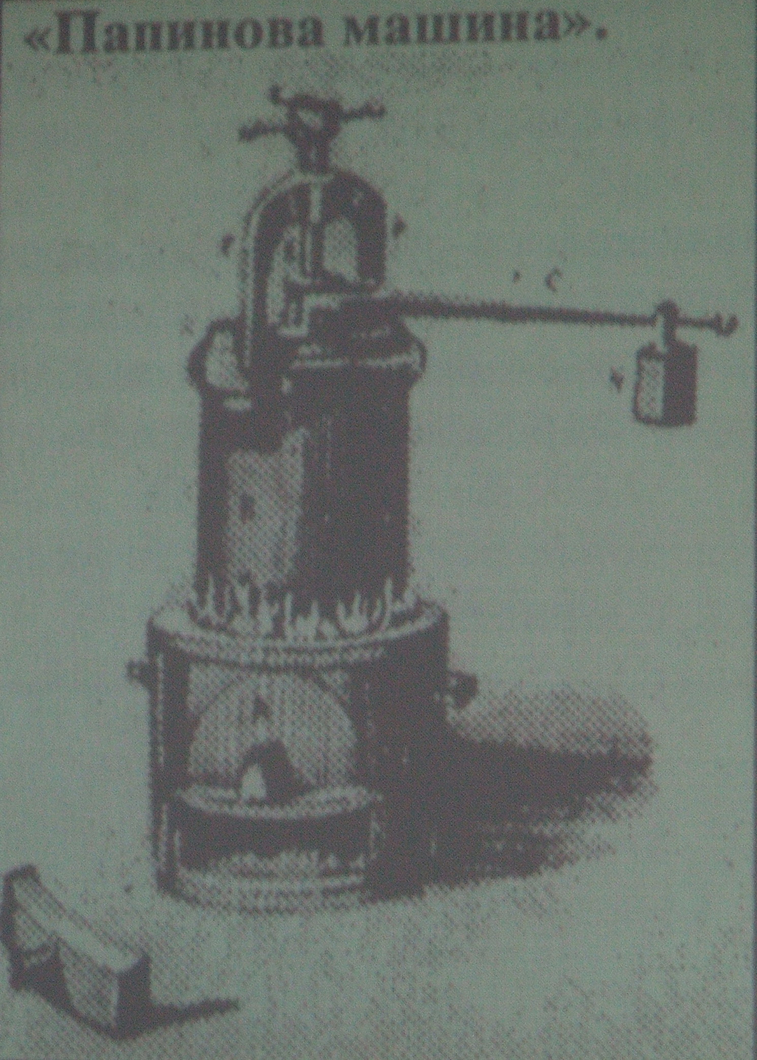 рисунок "Папиновой машины" использовавшейся М.В. Ломоносовым для определения вязкости жидкостей, сделанной на Сестрорецком оружейном заводе